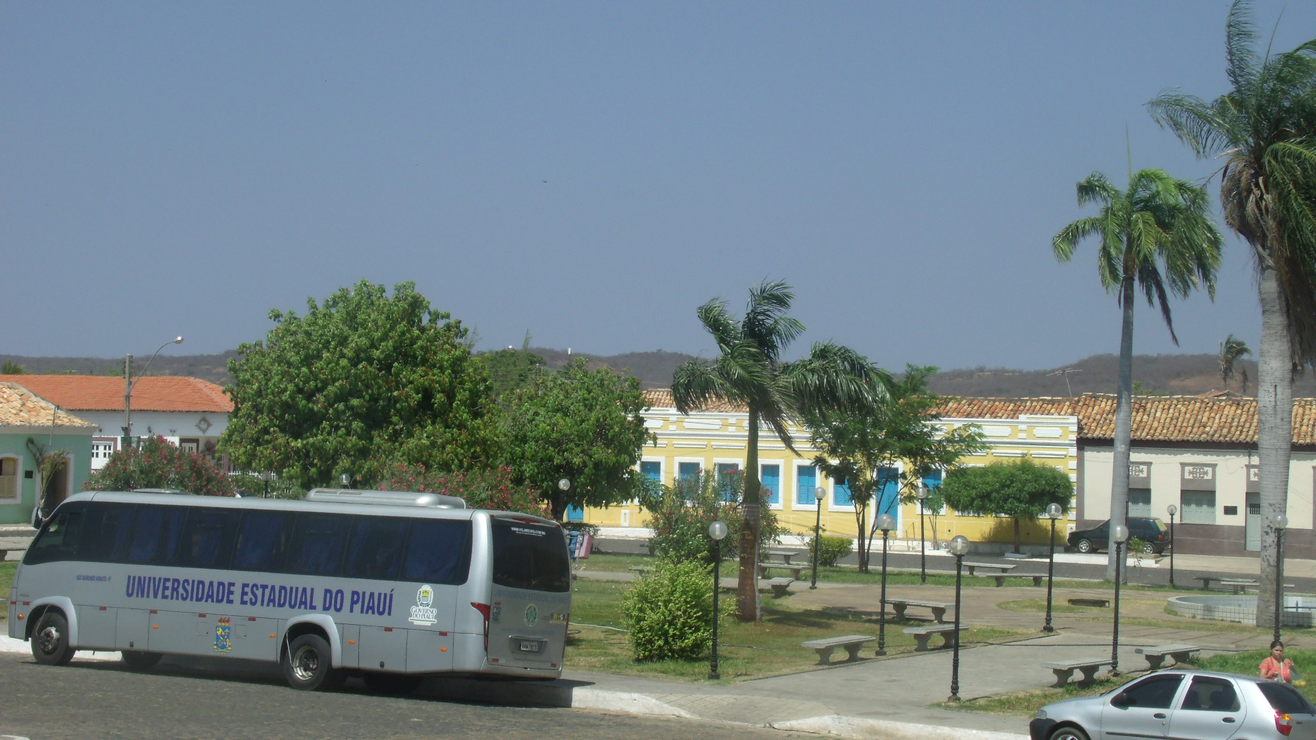 Vista da catedral de nossa senhora da vitória em Oeiras Piauí.